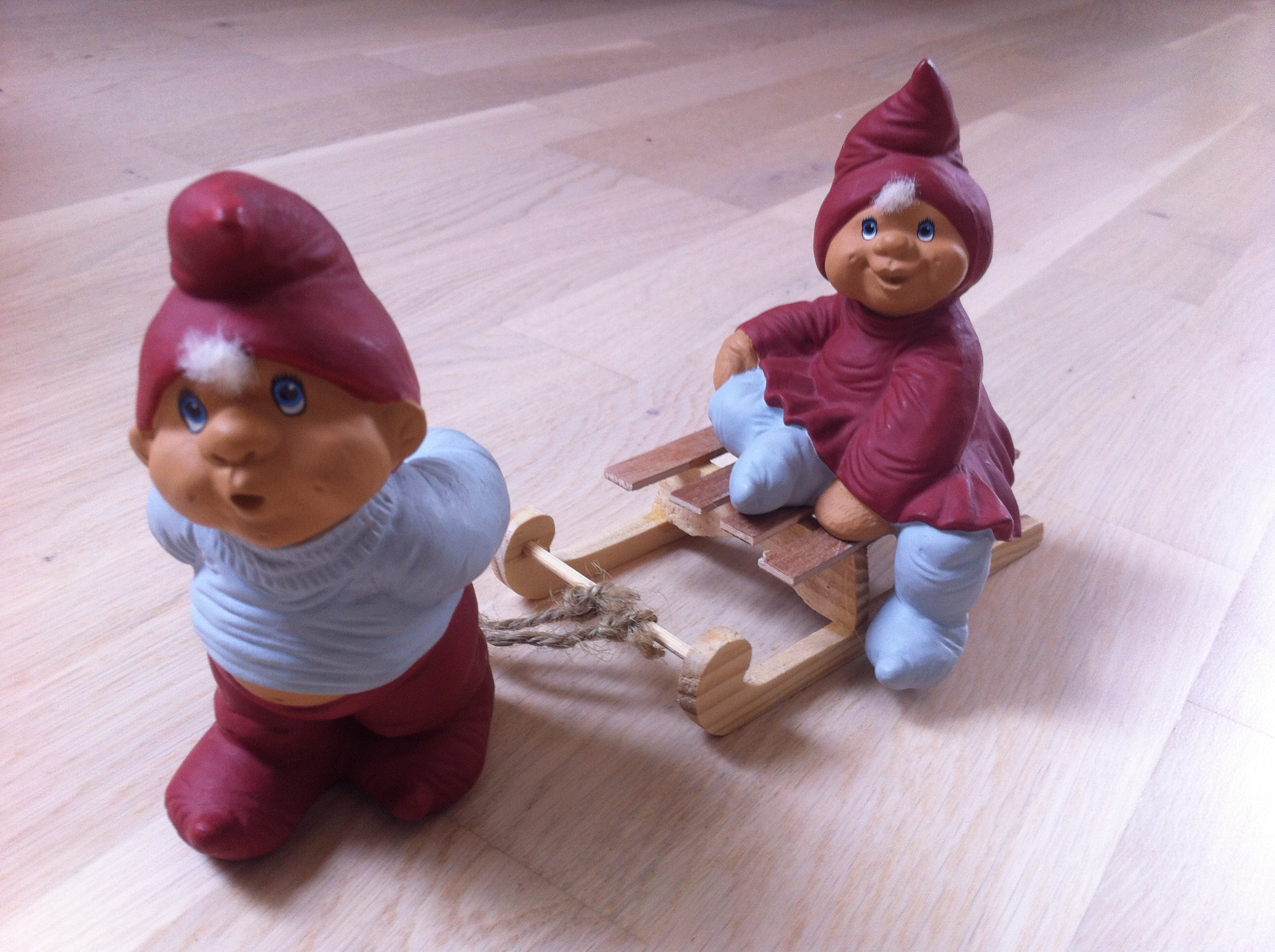 Trip Trap Nisser fra 2005. De er lavet af virksomheden Rikki Tikki Company.